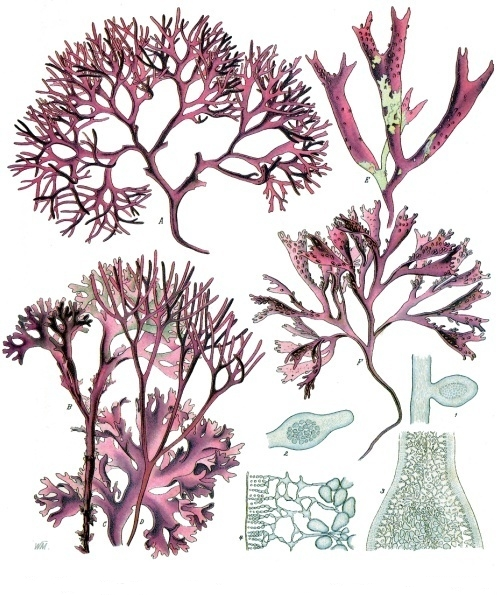 Knorpeltang. A B C D verschiedene Formen von Chondrus crispus Lyngb.; E F Formen von Gigartina mamillosa Ag., natürl. Grösse; 1 Längsschnitt durch einen Lappen mit Kapselfrucht von Gigartina mamillosa, vergrössert; 2 Querschnitt durch einen fruktificirenden Lappen des Thallus von Chondrus crispus, desgl.; 3 Theil eines solchen Querschnittes mit einem Theile des Cystocarpes, desgl.; 4 desgl., sehr stark vergrössert. Gigartina mamillosa = Mastocarpus stellatus